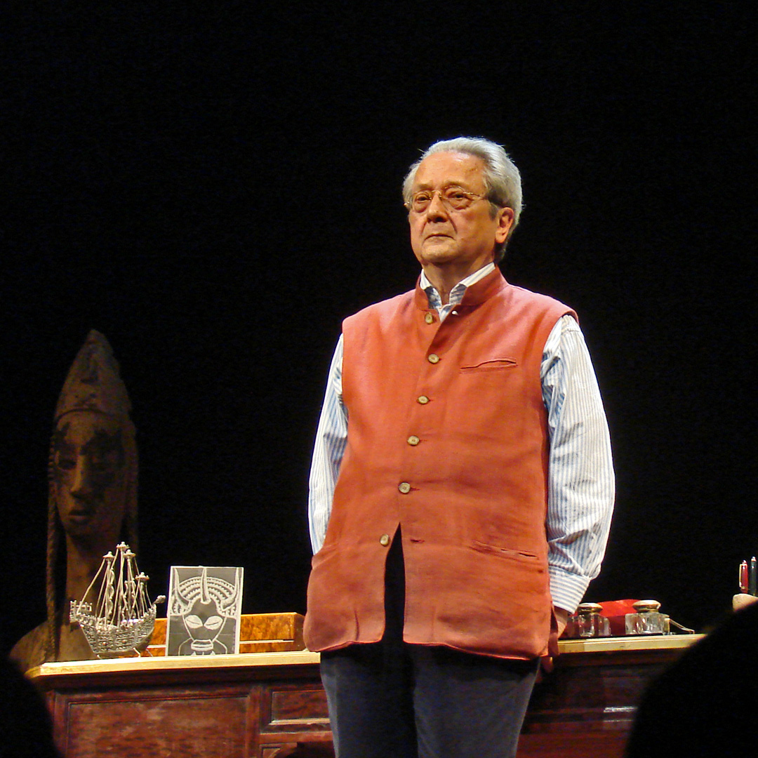 "Serial plaideur" de et avec Jacques Vergès Création au Théâtre de la Madeleine Du 21 septembre au 29 décembre 2008